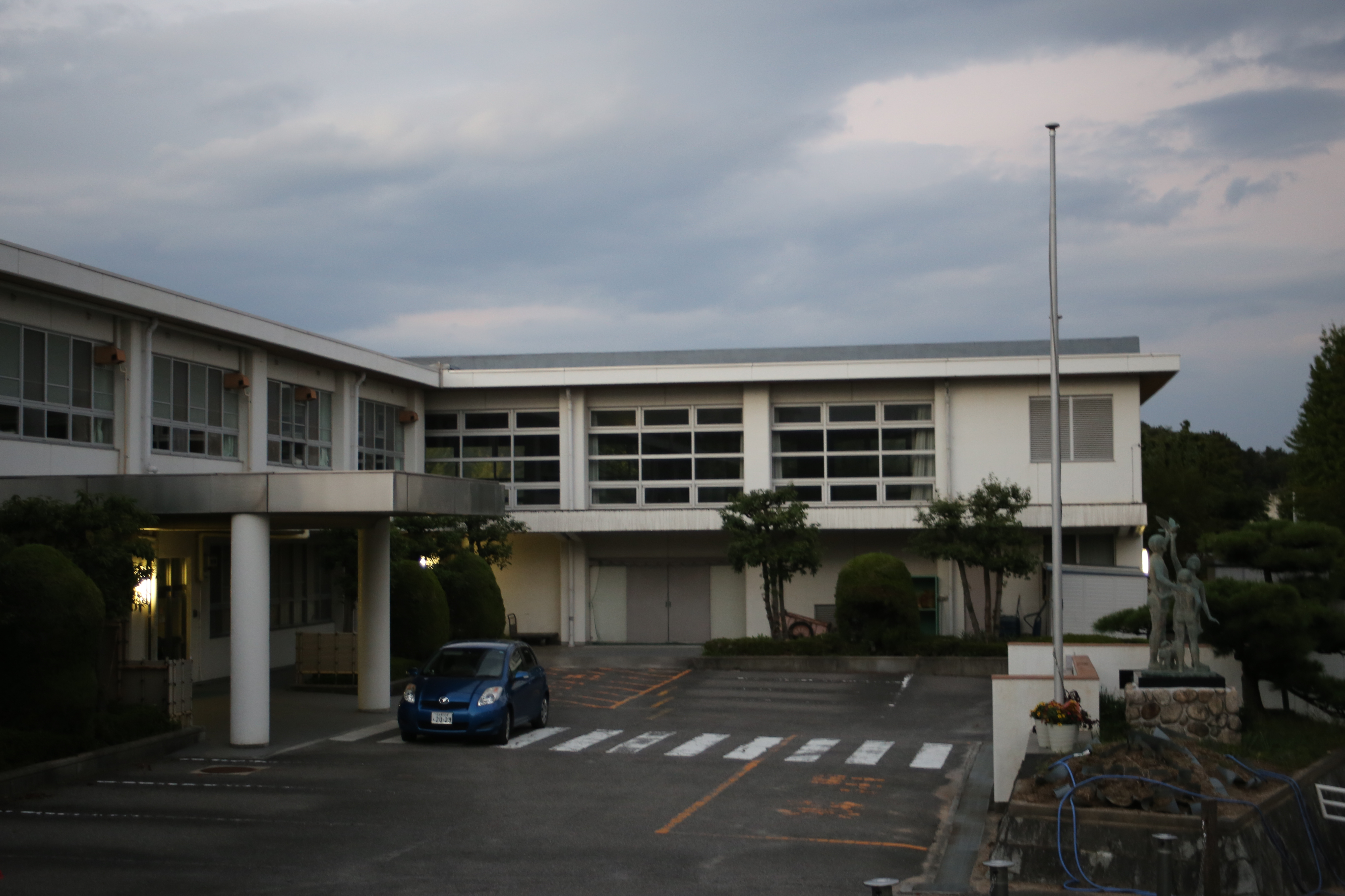 名古屋市天白区植田山の名古屋市立天白養護学校を南側公道西側より撮影